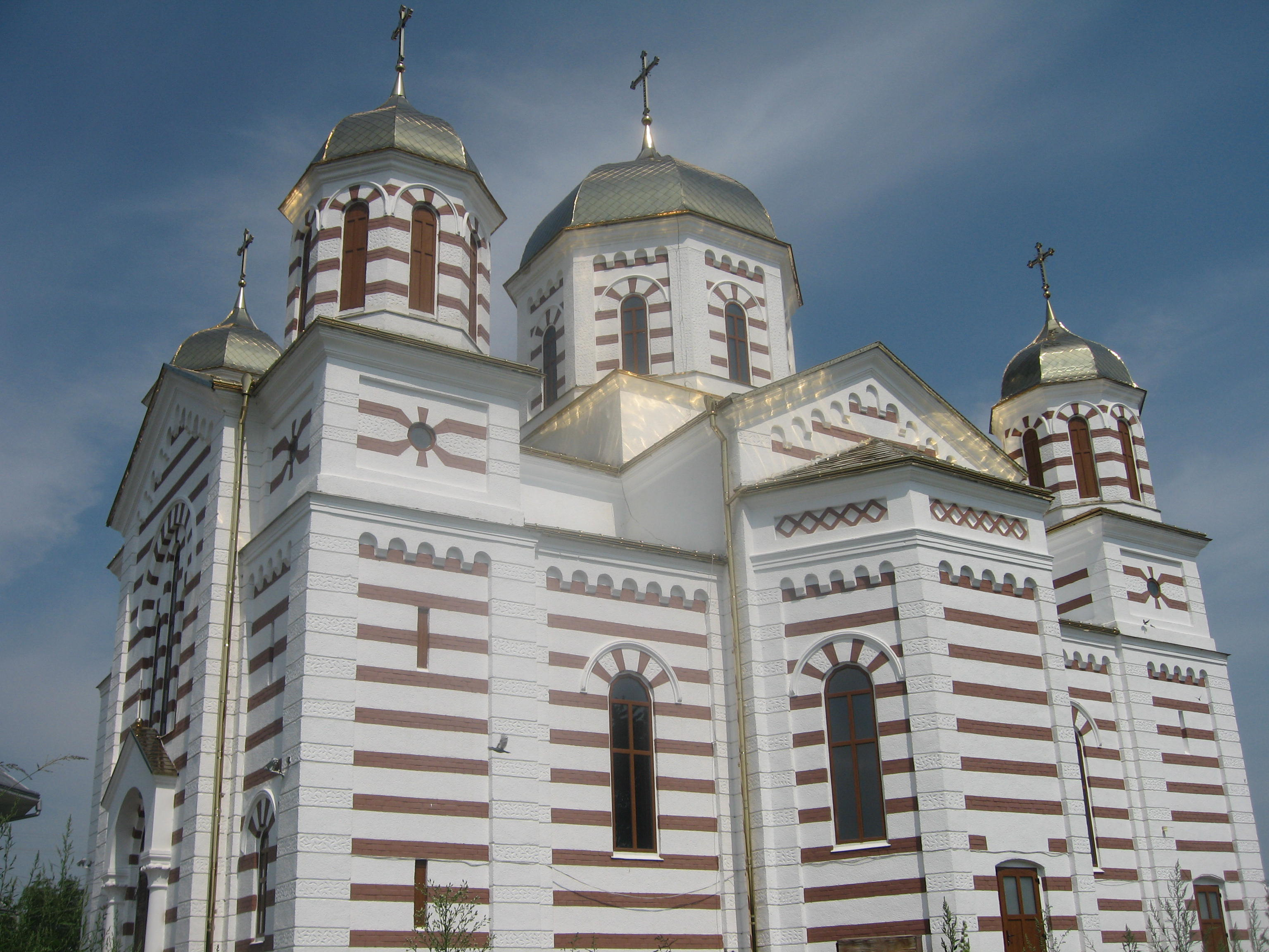 Biserica Sf. Arhangheli din Cajvana, Suceava County